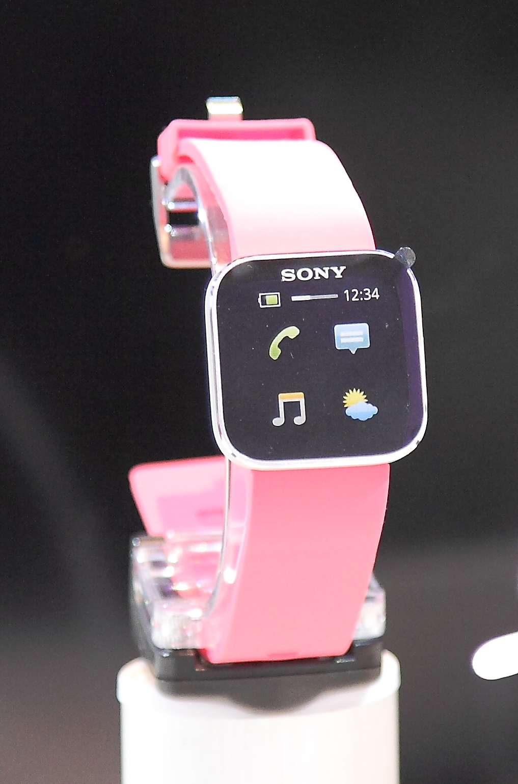 Sony; SmartWatch; MN2; Android 2.1 and later; multi-level touchscreen; bluetooth 3.0; OLED 1.3 display